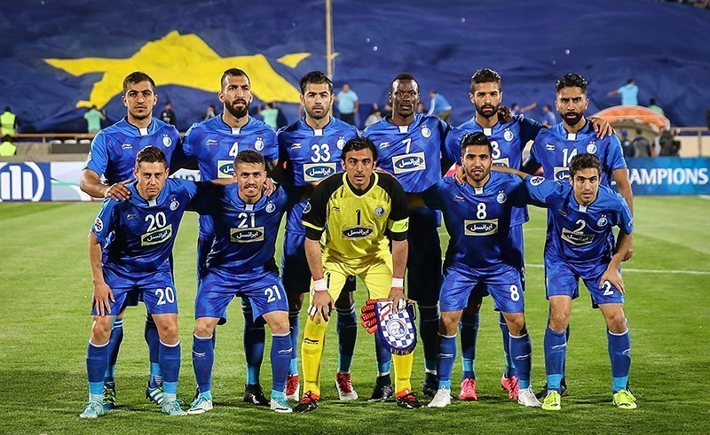 عکس تیمی استقلال مقابل ذوب‌آهن در ۲۶ ارديبهشت ۱۳۹۷